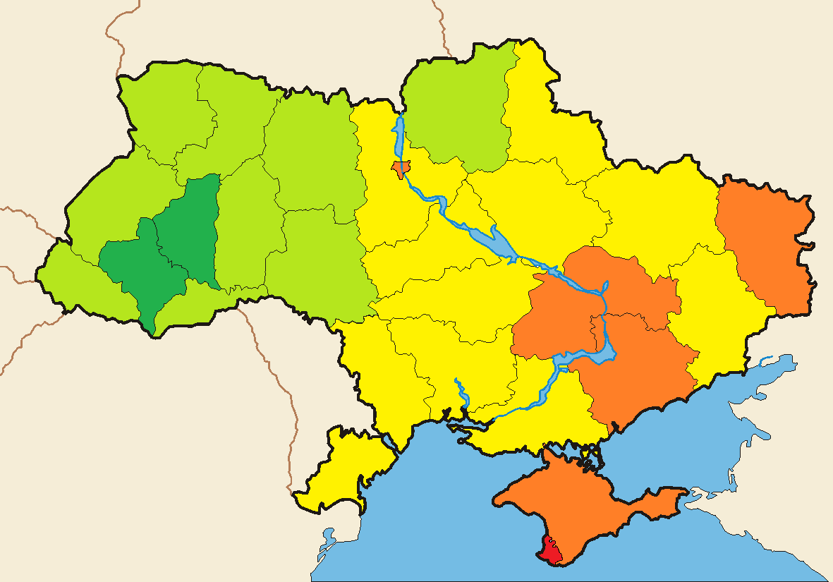 Кількість злочинів на 10 тис. населення станом на 2013 рік (за регіонами). На основі статистики з довідника (с. 466) і даних про населення регіонів України за початок 2014 року. Що червоніший колір, то більша кількість злочинів, що зеленіший - менша.